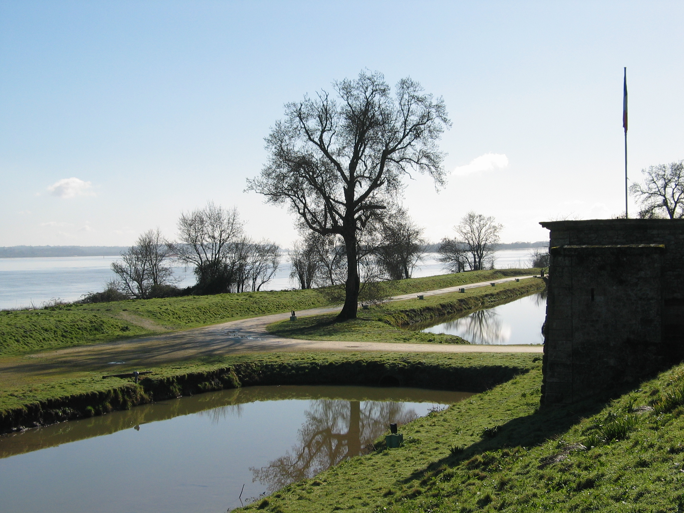 Vue sur la Gironde, du corps de garde du Fort Médoc